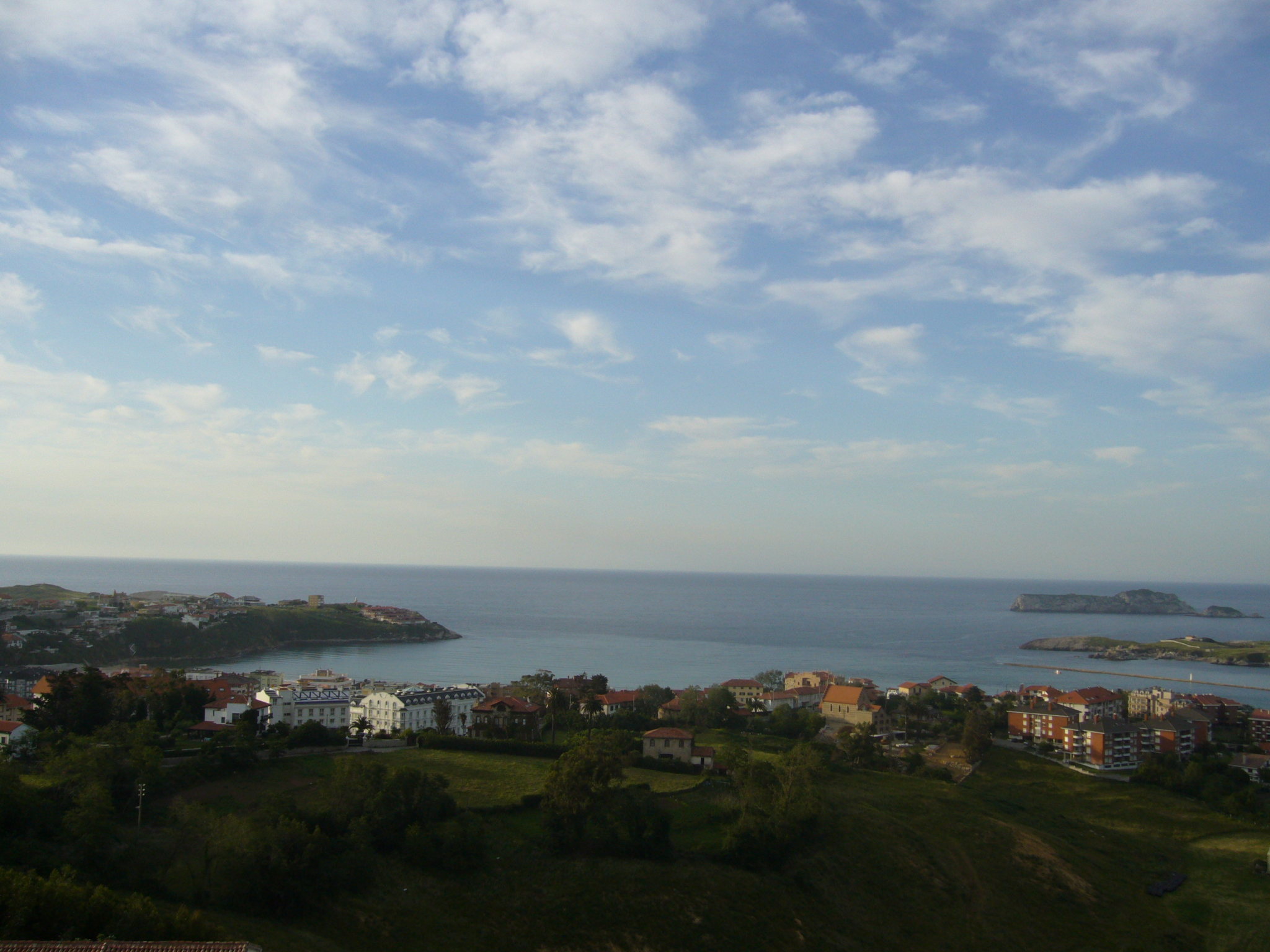 Vista de la localidad de Suances, en Cantabria (España)